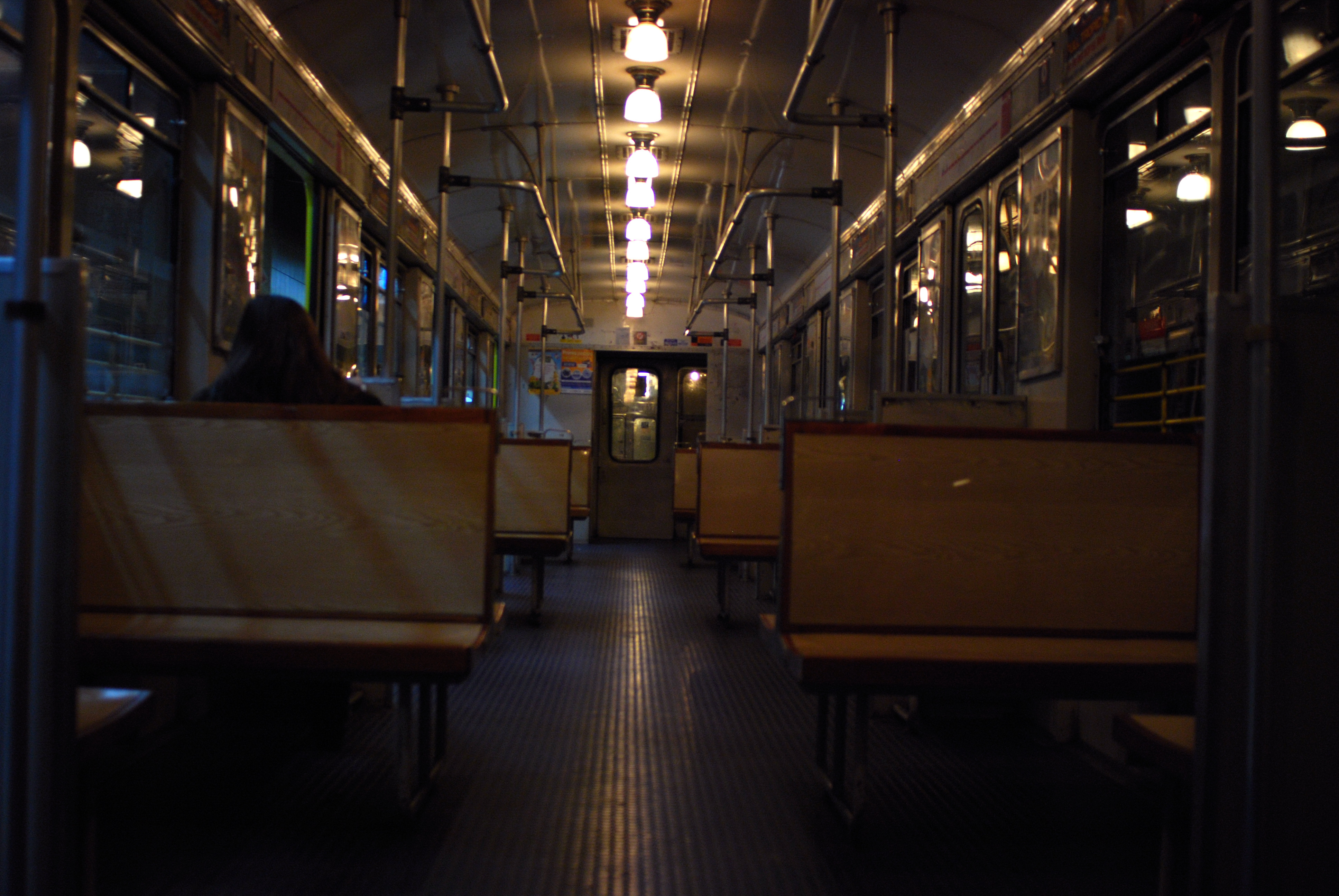 Interior de uno de los coches CAF de la línea E de subtes en Buenos Aires, Argentina